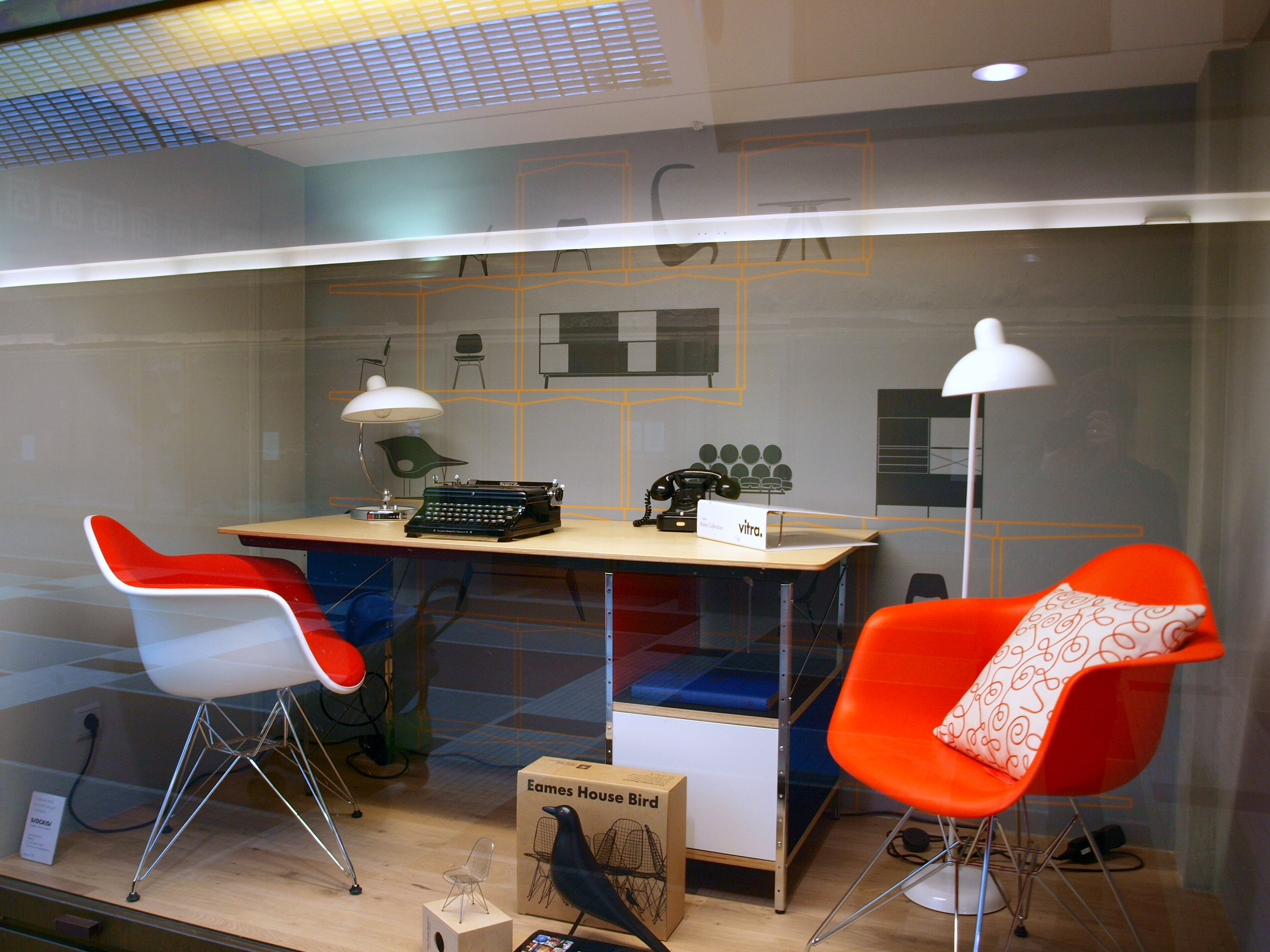 Vitra Design Museum Prague